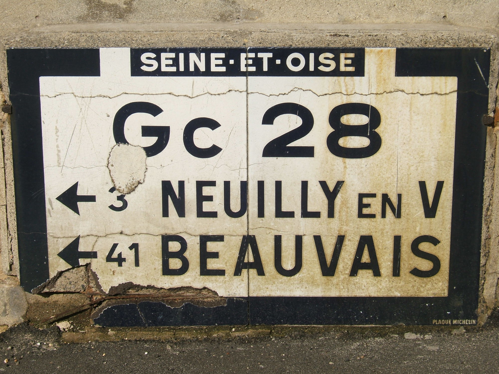 Panneau du Gc 28 à Marines (Val-d'Oise) / Roadsign of the Gc 28 in Marines (Val-d'Oise)